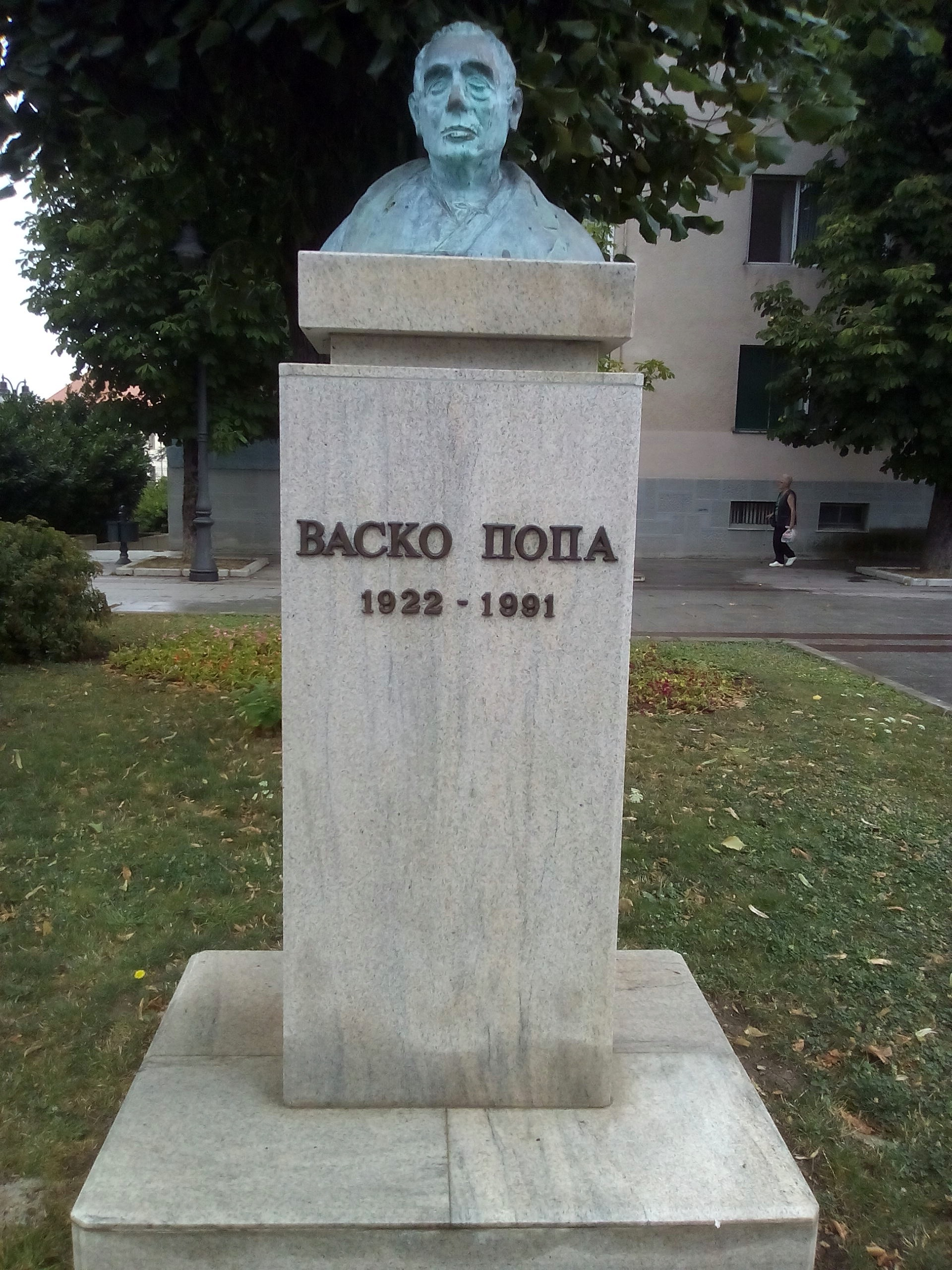 Споменик Васку Попи у Вршцу